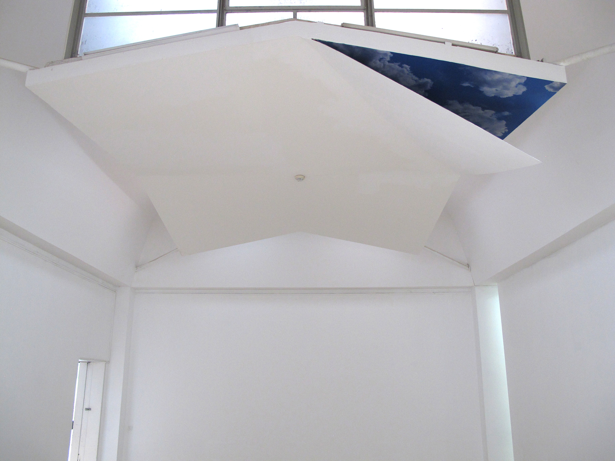 מיצב צילומי ייעודי לחלל, מראה הצבה, 2019 טכניקה מעורבת. הוצגה בתערוכה 14 כיוונים לרוח: דיוקן המשכן באוצרותם של יניב שפירא וטל גלפר. .משכן לאמנות עין חרוד, קיבוץ עין חרוד